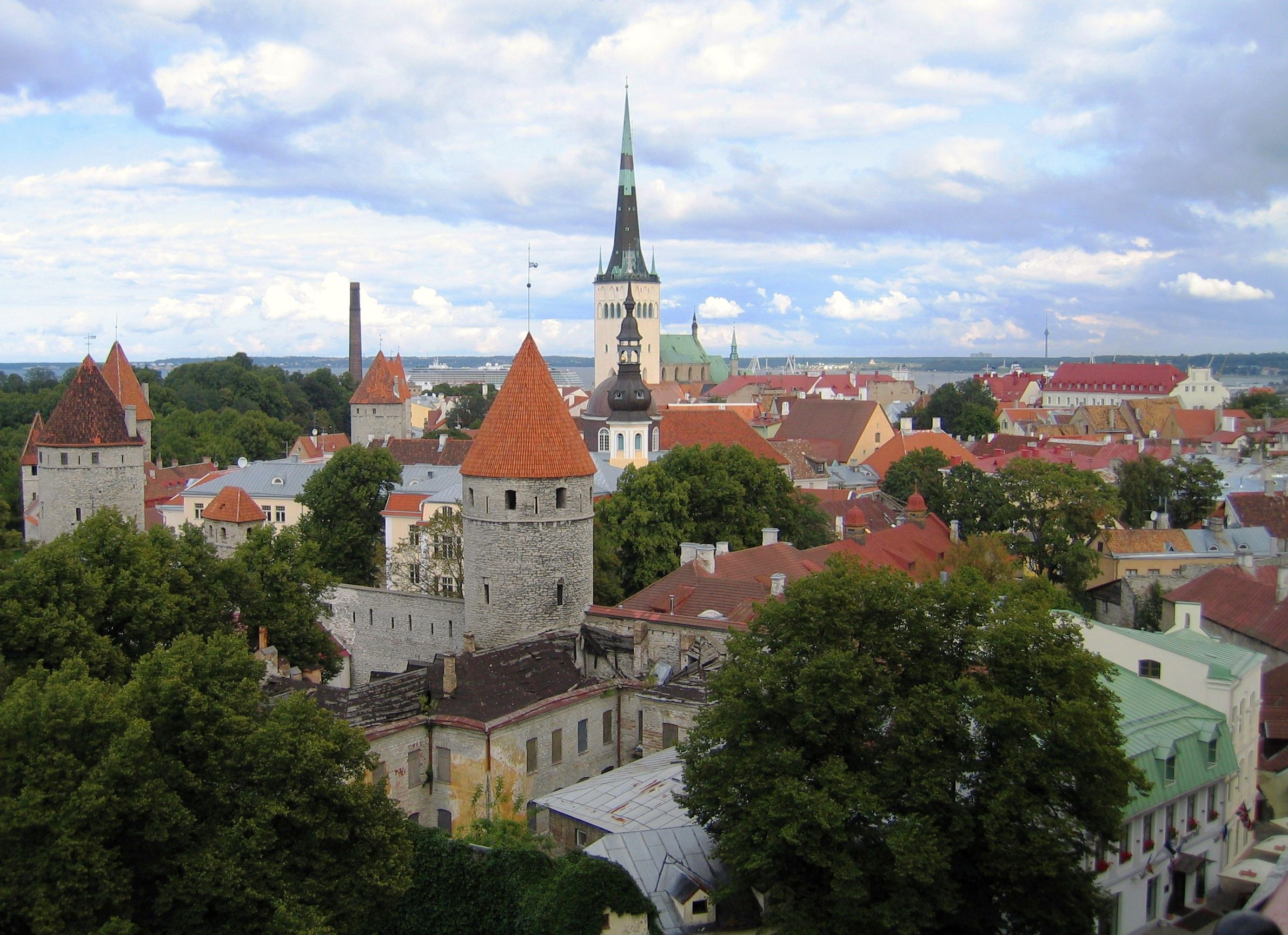 Tallinn - Vista general